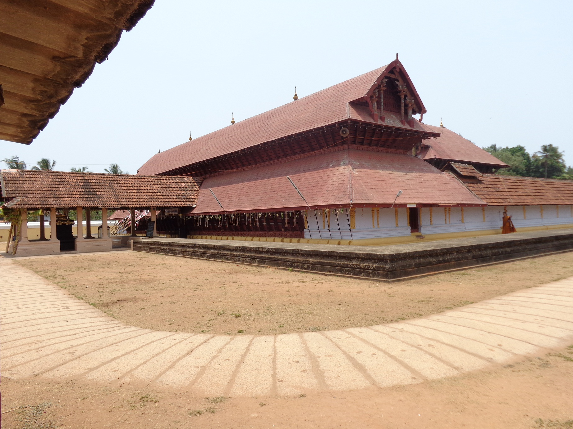 തിരുവങ്ങാട് ശ്രീരാമസ്വാമിക്ഷേത്രത്തിന്റെ മുൻ വശം ദൃശ്യം